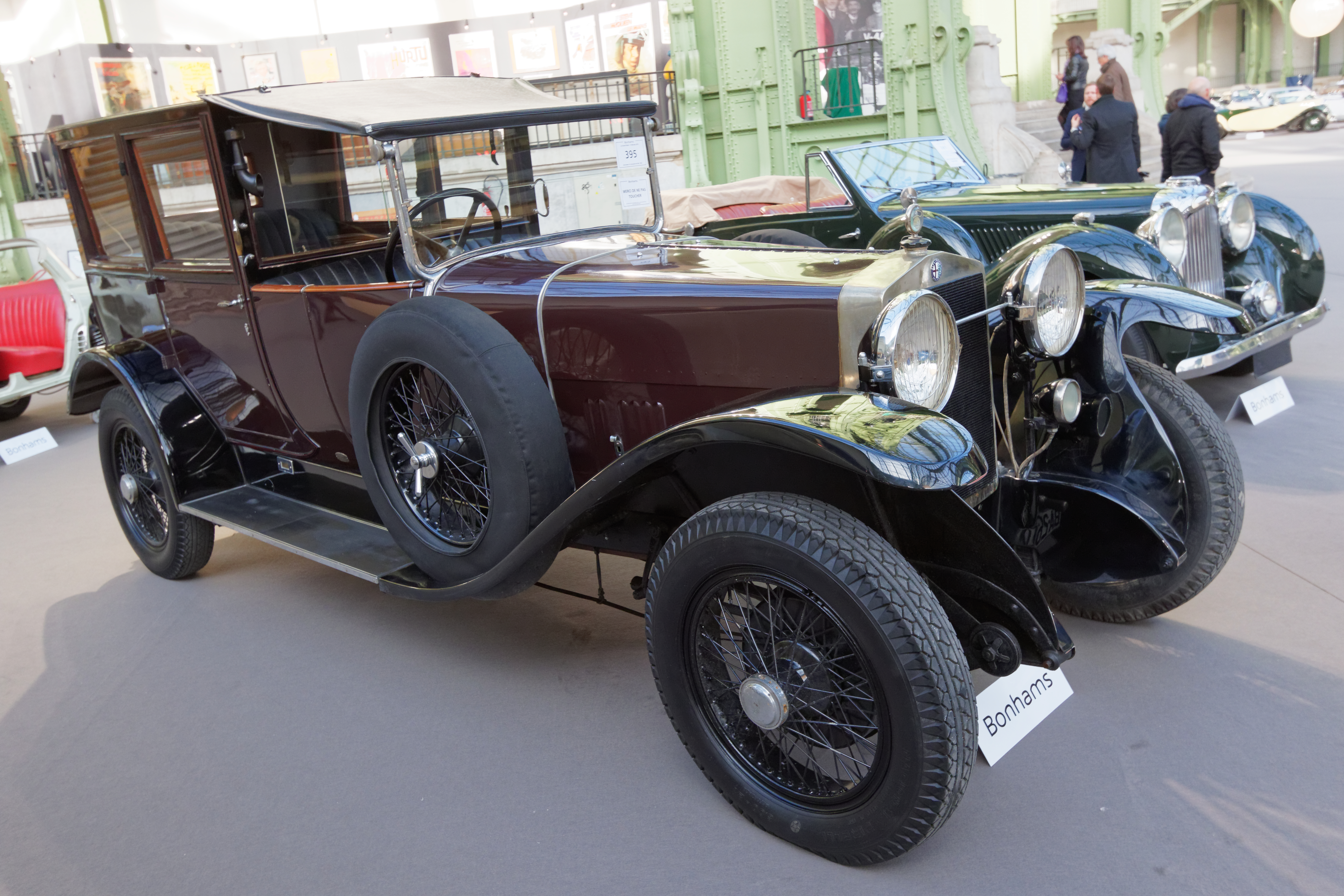 Un des véhicules présenté lors de la vente aux enchères Bonhams 2015 au Grand Palais de Paris.